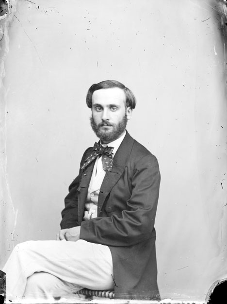 Fonds Trutat - Photographie ancienne Cote : TRU C 1164 Localisation : Fonds ancien (S 30) Original non communicable Titre : Ego [Eugène Trutat], atelier Vidal, 1859 Auteur : Trutat, Eugène Rôle de l’auteur : Photographe Lieu de création : Atelier Vidal (Toulouse) Date de création : 1859 Mesures : : 12 x 9 cm Observations : Notes de la main de E. Trutat : "coll. humide" Mot(s)-clé(s) : -- Homme -- Costume masculin -- Portrait -- Atelier d'artiste -- Chaise -- Assis -- Trois-quarts (de) -- Trutat, Eugène -- Atelier Vidal (Toulouse) -- Toulouse (Haute-Garonne) -- Toulouse (Haute-Garonne ; canton) -- Midi-Pyrénées (France) -- 19e siècle, 3e quart Médium : Photographies -- Négatifs sur verre au collodion humide -- Noir et blanc -- Portraits Bibliothèque de Toulouse. Domaine public